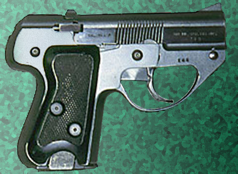 Semmerling LM-4